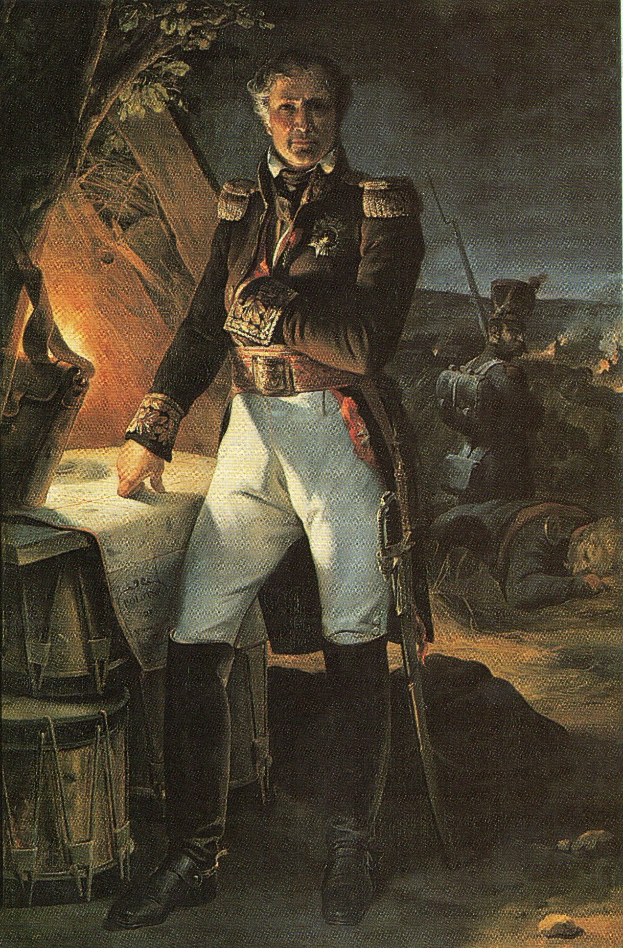 Le maréchal Laurent de Gouvion-Saint-Cyr en petite tenue de général de division.